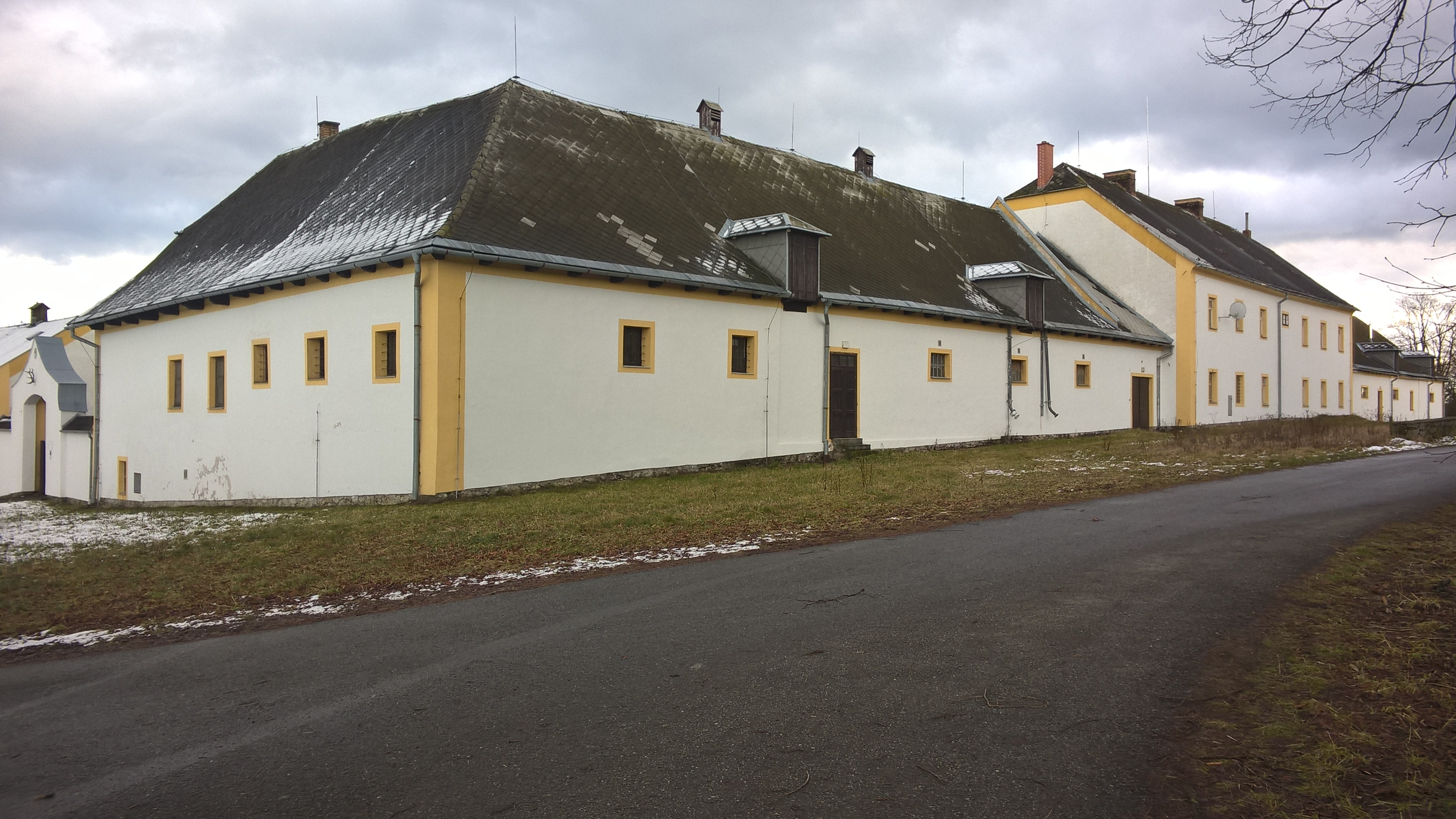 Zemědělský dvůr Lyra, Dvorská 33/16, 123/14, 95/12, Zámek Žďár, Žďár nad Sázavou.